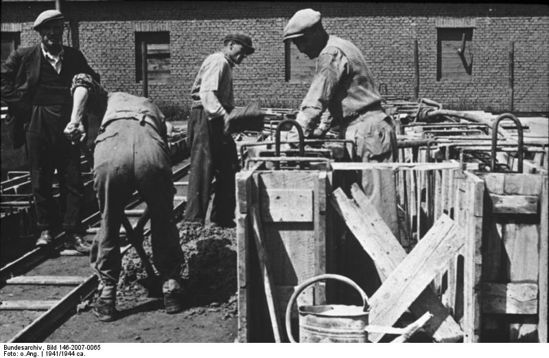 16 Fertigbeton